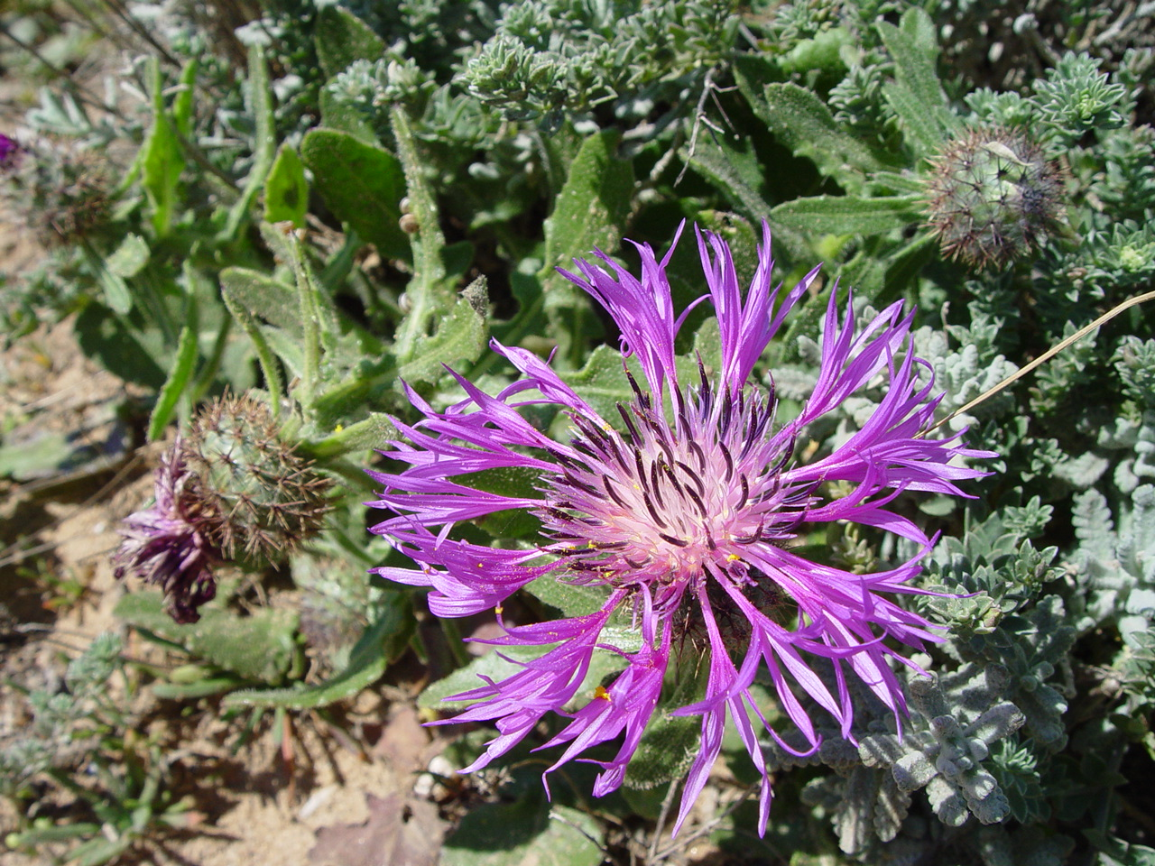 Name Centaurea sphaerocephala Familiy Asteraceae